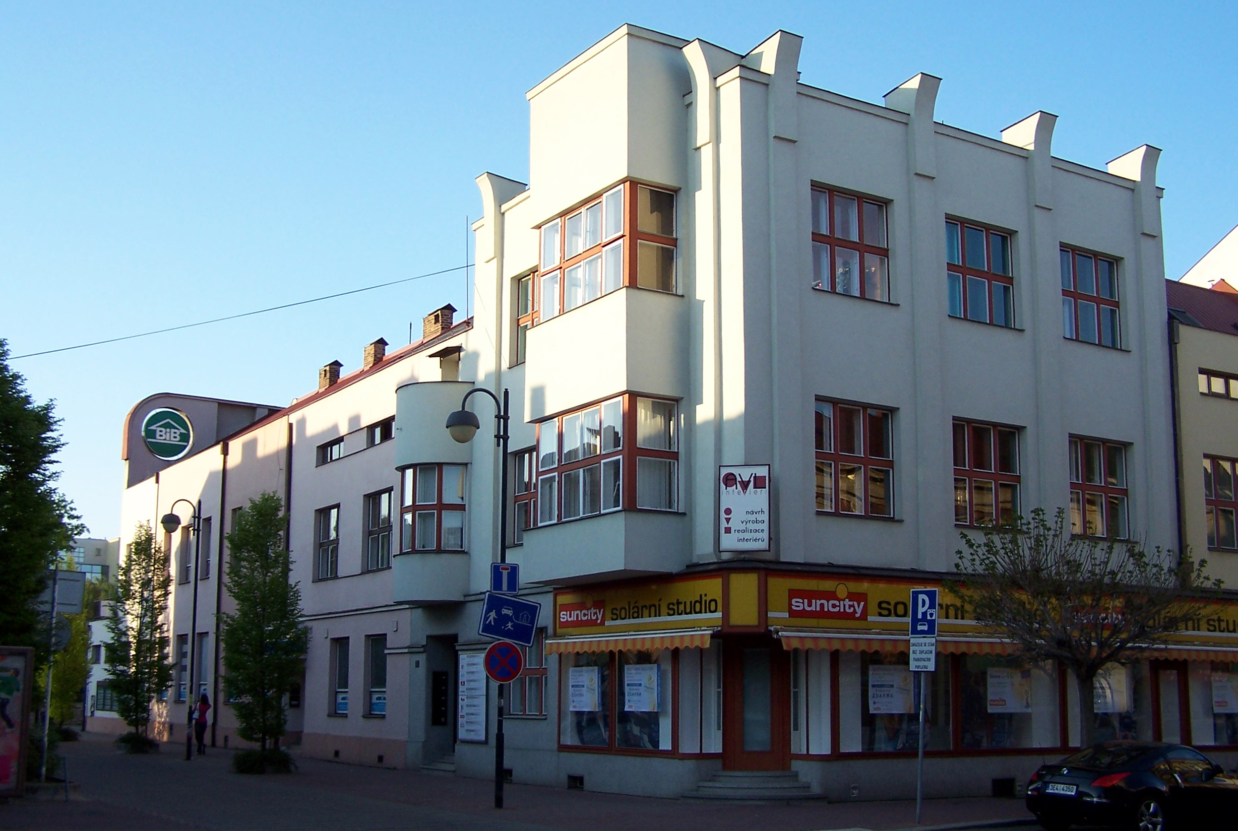 Dům Josefa Otty Pardubice - roh ulice Bratranců Veverkových a Smilovy. Architekt: Karel ŘEPA (1921 - 1923)